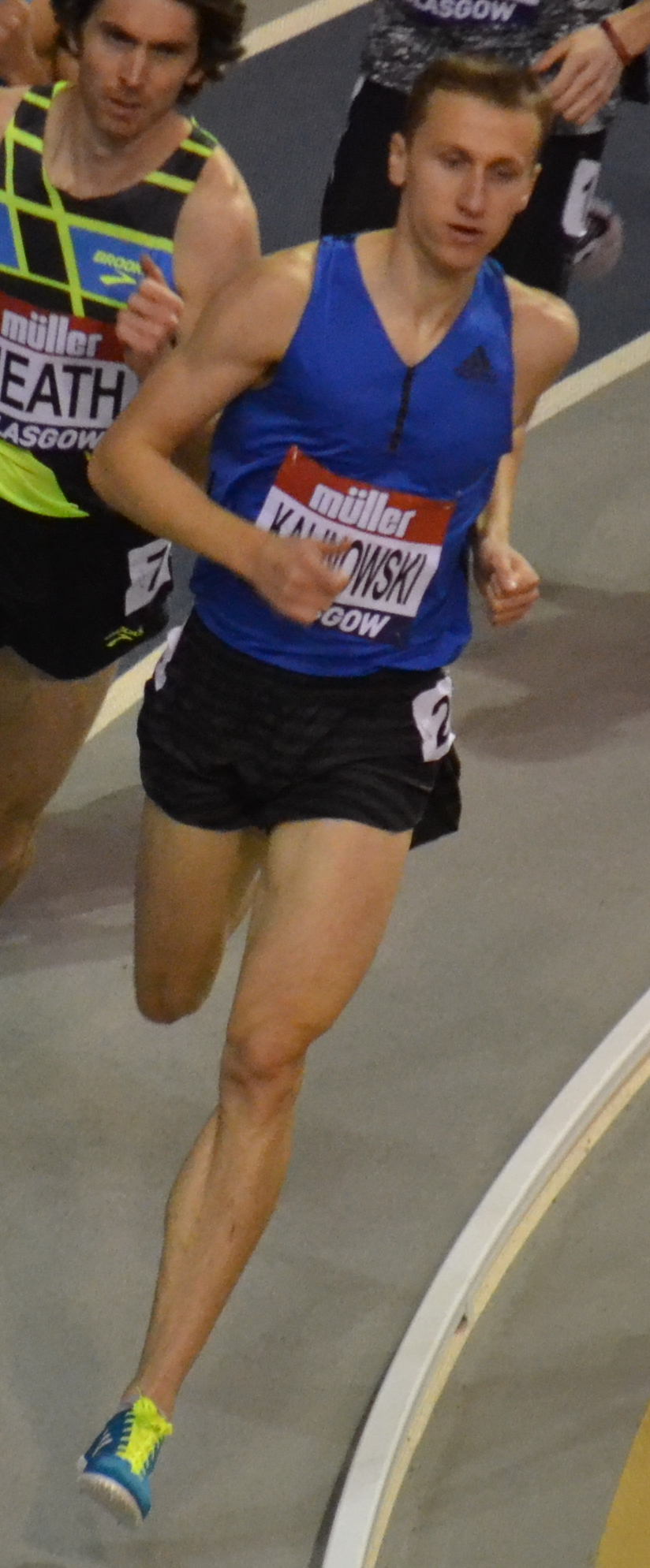 Grzegorz Kalinowski, Müller Indoor Grand Prix Glasgow (2018)